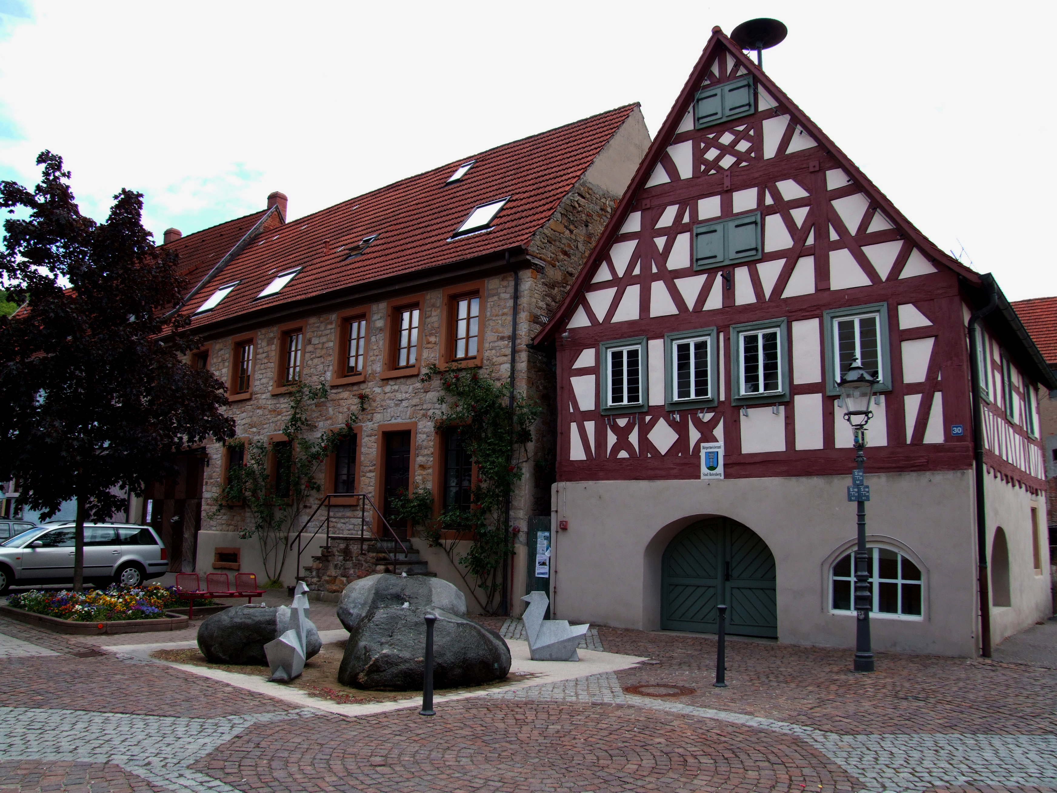 Ortsmittelpunkt Rauenberg-Rotenberg mit Rathaus